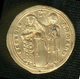 Byzantine; Solidus; Coins